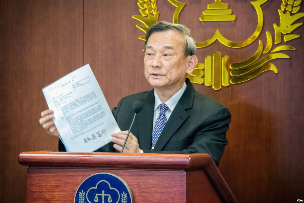 中華民國法務部記者會，法務部政務次長陳明堂宣布，前總統陳水扁獲准保外就醫。